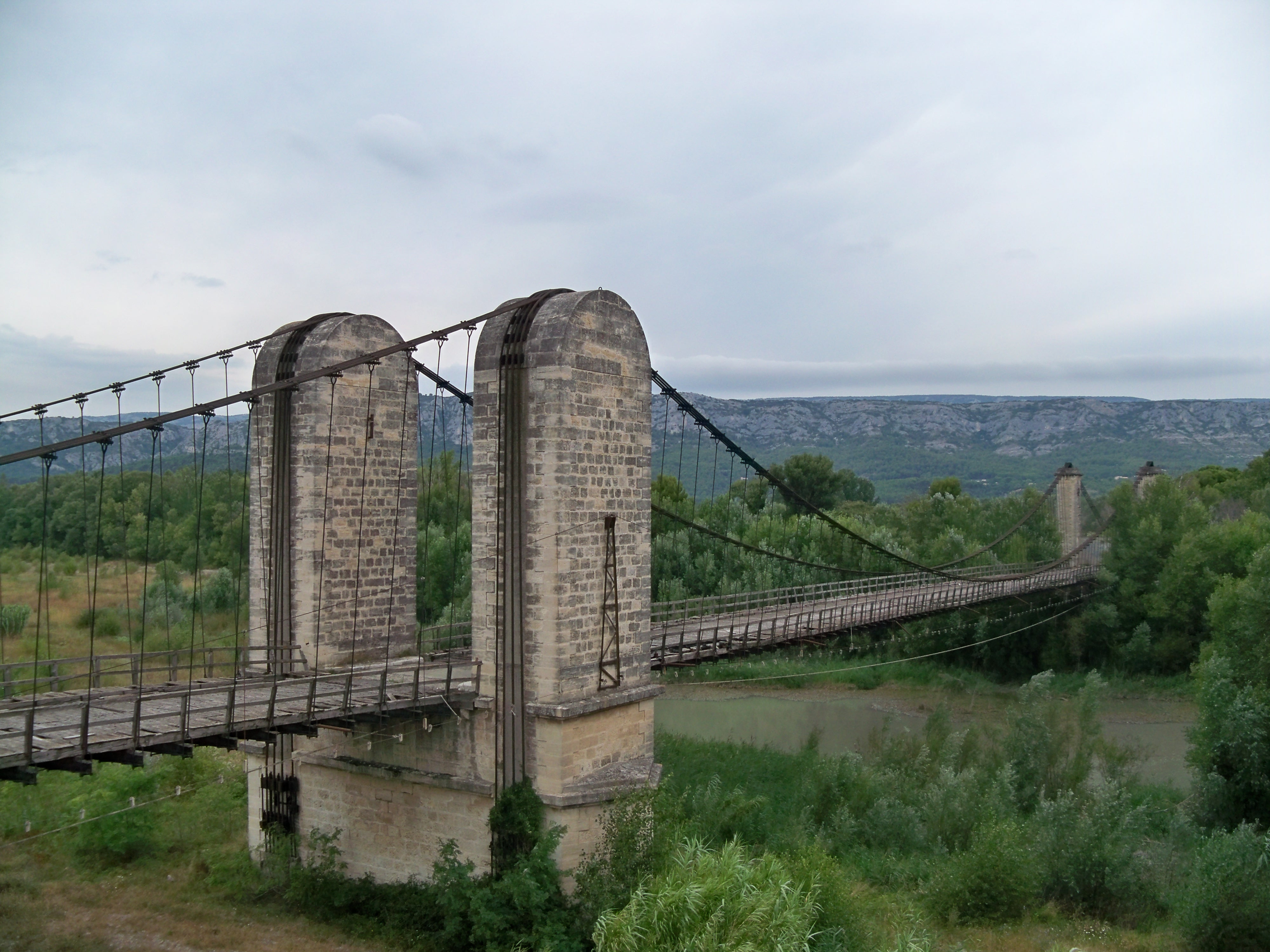 Pont suspendu sur la Durance entre Mallemort (Bouches-du-Rhône) et Mérindol (Vaucluse), France